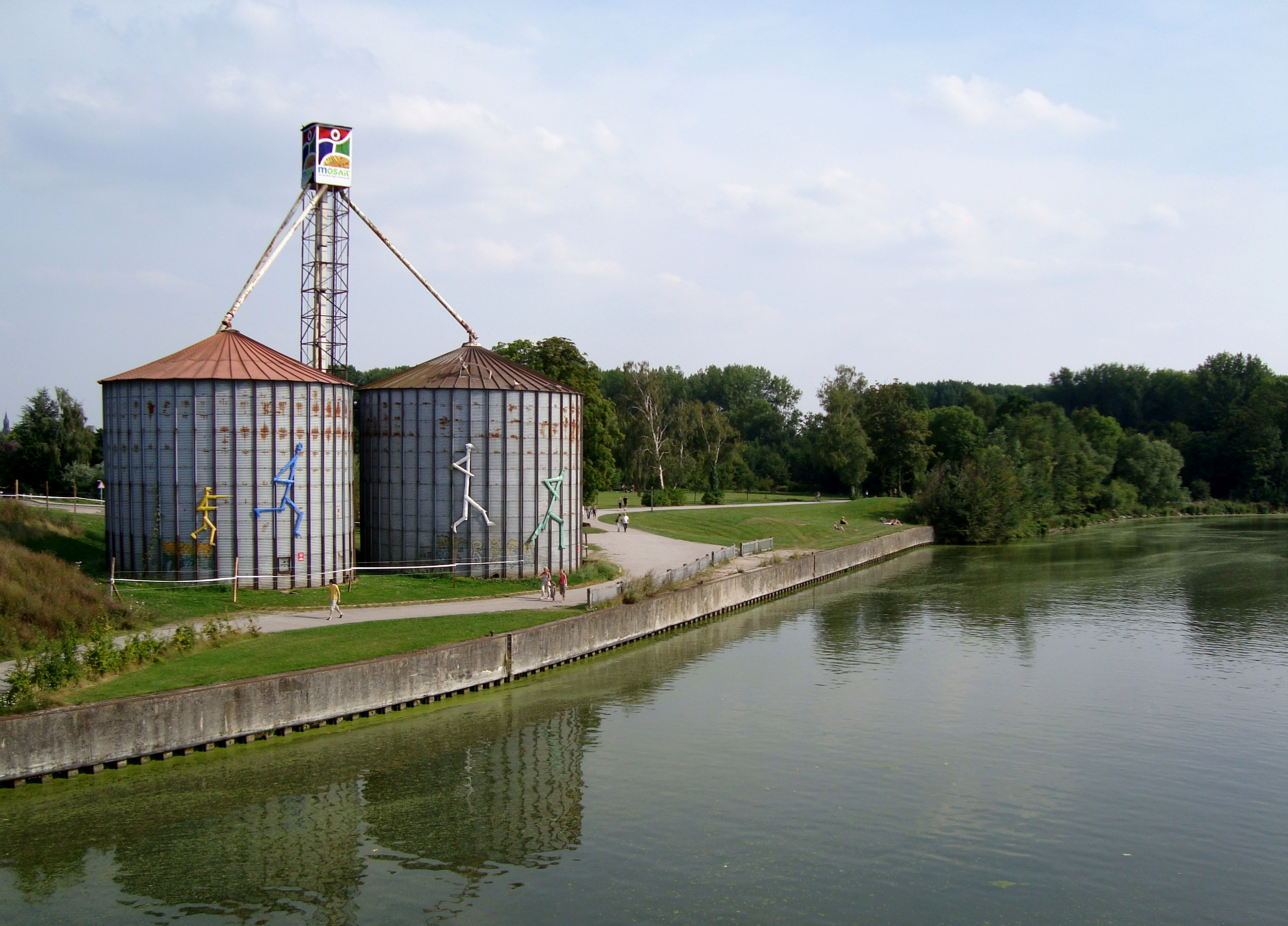 L'entrée du Parc Mozaïc dans le parc de la Deûle à Houplin-Ancoisne (Nord).